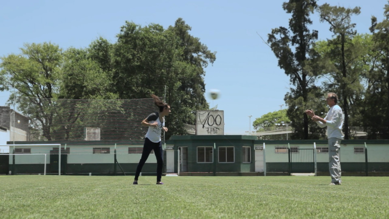 María Belén Potassa es una futbolista argentina que juega en el Club Deportivo UAI Urquiza de la Primera División Femenina de Argentina. Jugó en Rosario Central,​ San Lorenzo de Almagro​, Santiago Morning​ de Chile y Boca Juniors. Lleva más de 300 goles en su carrera y desde el año 2006 forma parte del plantel de la Selección Argentina La imagen corresponde al rodaje del Documental "Posición adelantada. Historias de otro fútbol" realizado por el #DCMTeam en el año 2017.